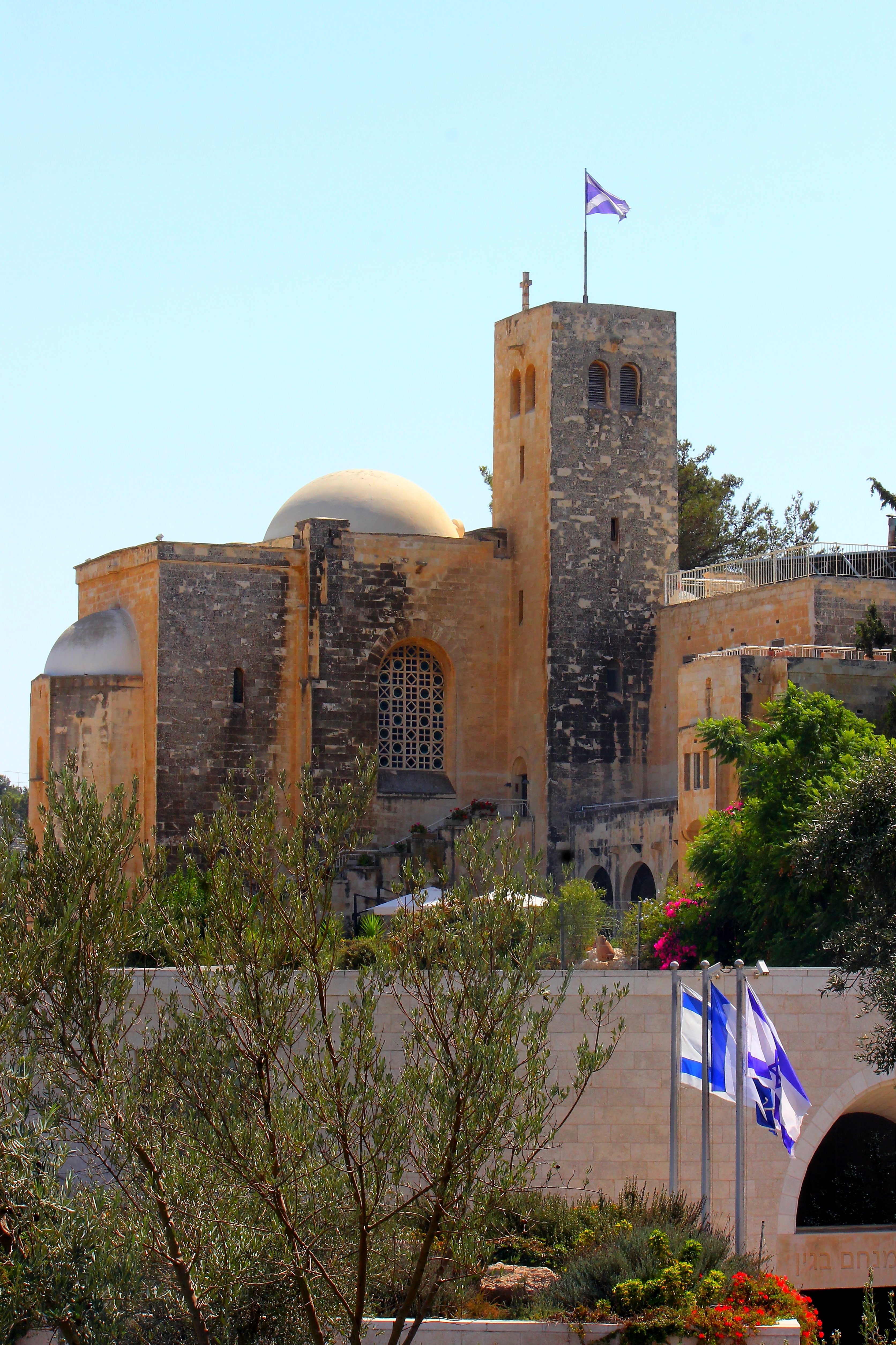 כנסיית סנט אנדרוז נמצאת על מורדות גבעת התנ"ך. הכנסייה שייכת לכנסייה של סקוטלנד, והיא נבנתה כמונומנט הנצחה לחיילים הסקוטים בצבא בריטי, חללי מלחמת העולם הראשונה.